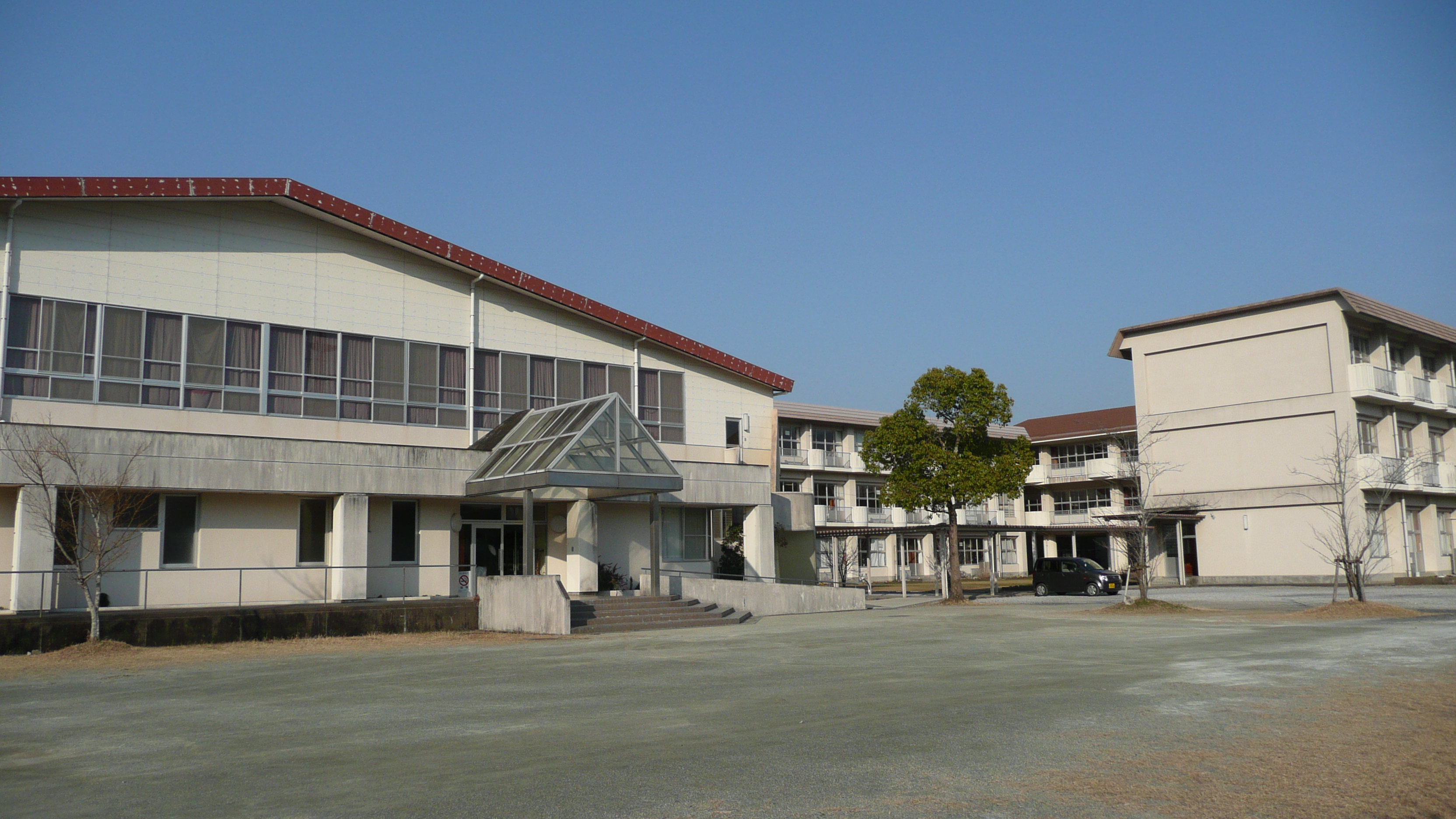 Ikimeminami junior high School (Miyazaki, Japan) 宮崎市立生目南中学校 校舎と体育館